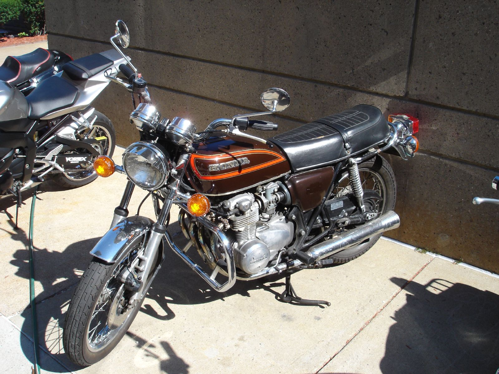 Honda CB550FourK